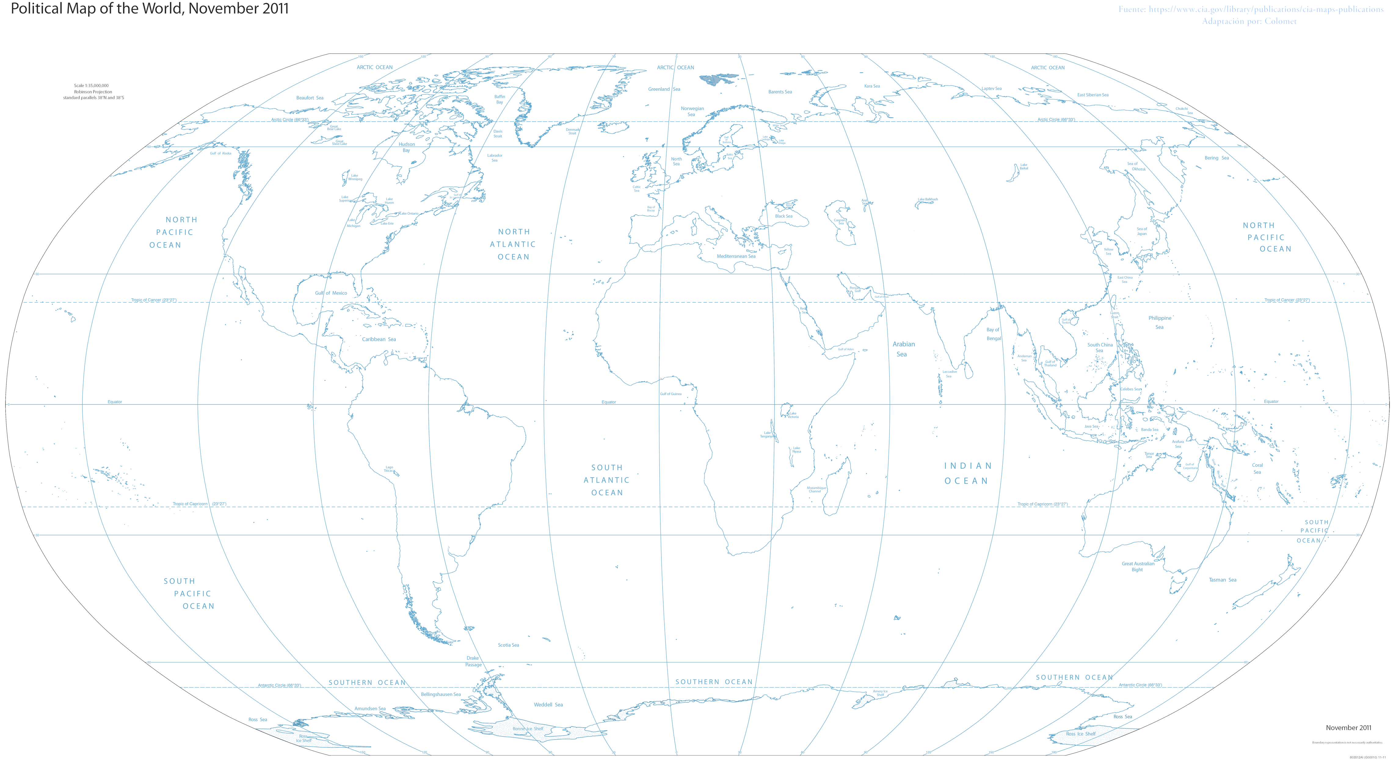 Mapa del mundo de colores blanco y azul